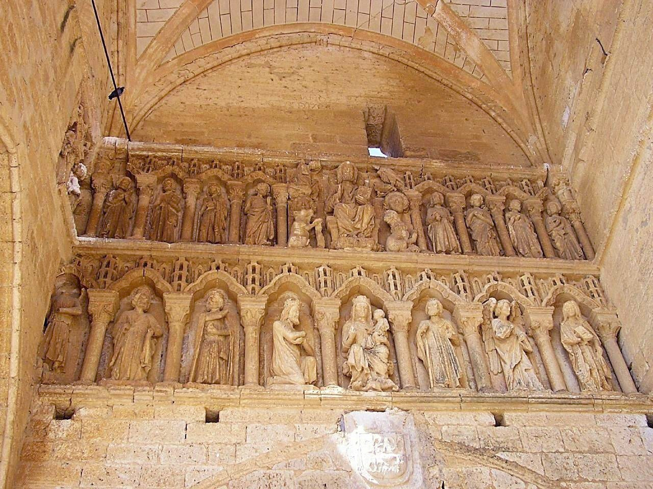 Villalcazar de Sirga - Santa Maria la Blanca, Palencia